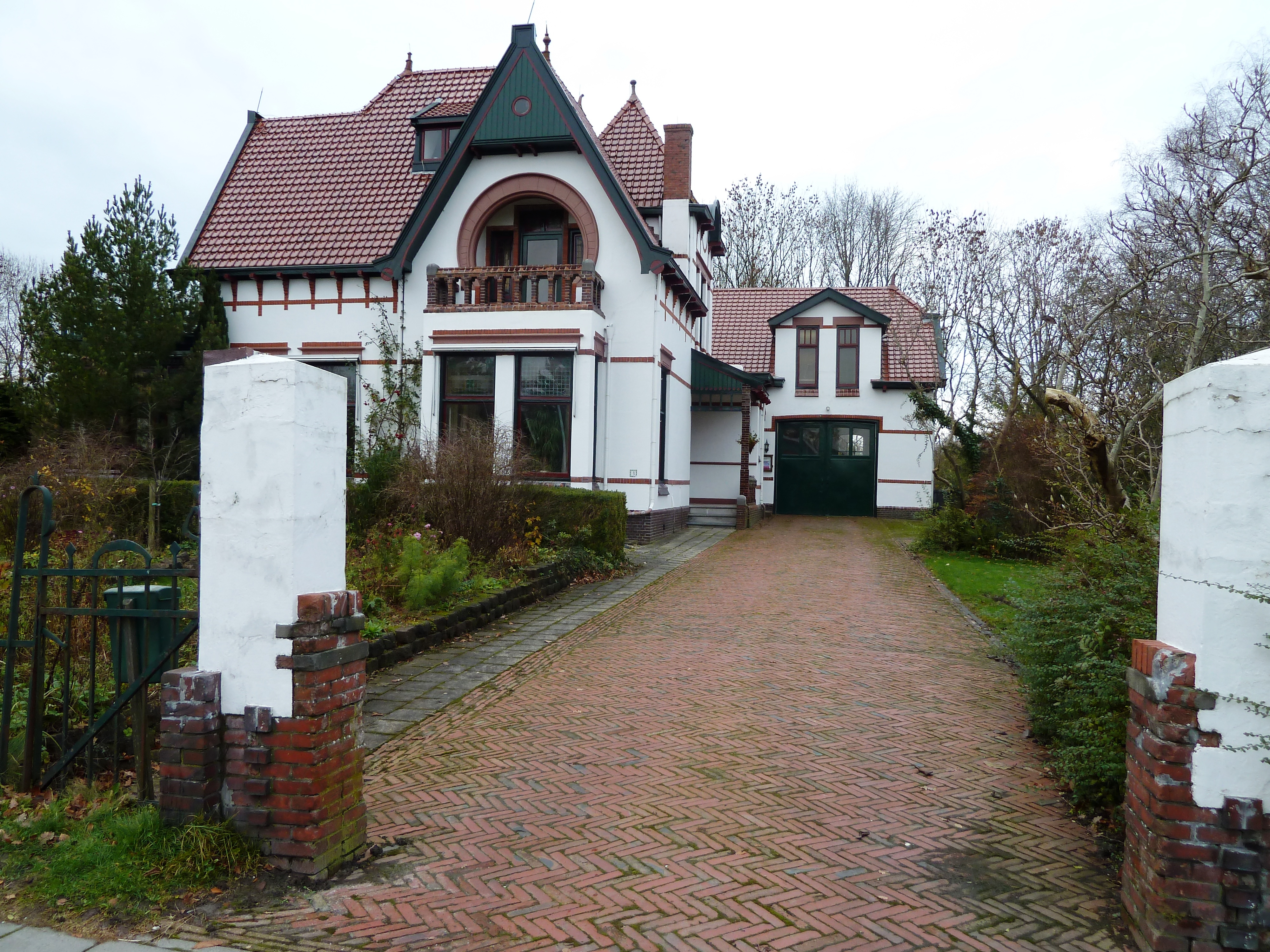 Dokterswoning met aangebouwd koetshuis en (groen) hek aan de Voorstraat 5 in het Friese dorp Kollum.